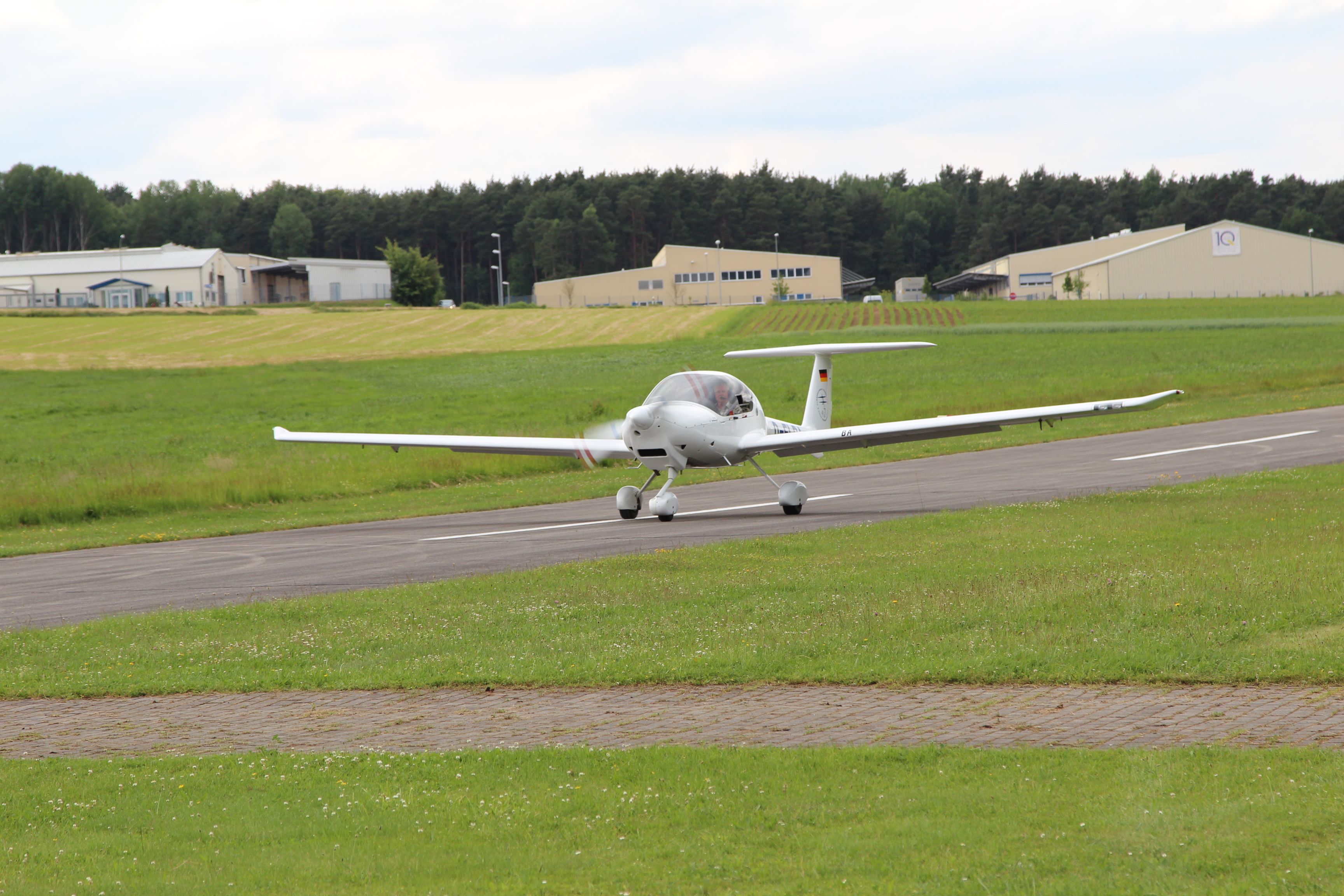 Flugplatz Schmidgaden (Landkreis Schwandorf, Oberpfalz, Bayern, Deutschland).